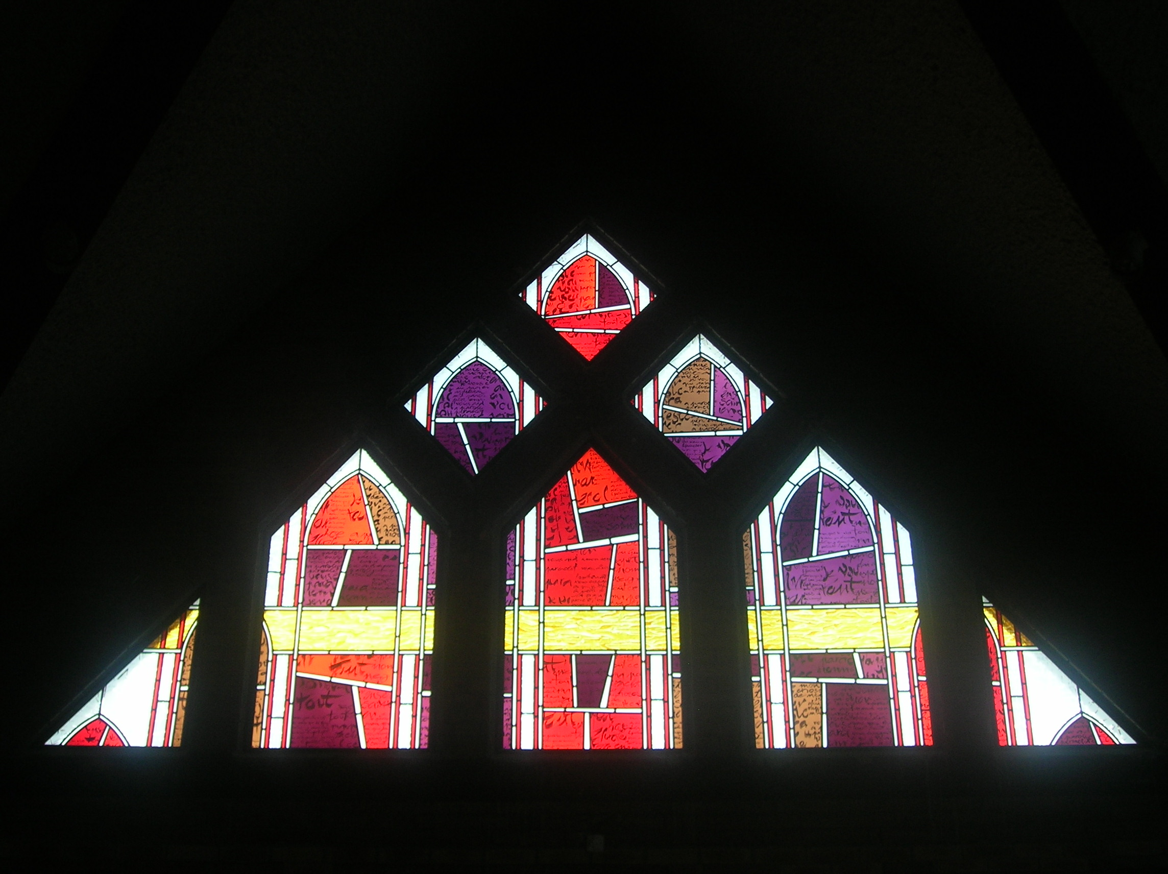 Vitraux de la Trinité à Issy-les-Moulineaux : le Fils. Verrier : Carlo Roccella. Bénits de 12 octobre 2007.